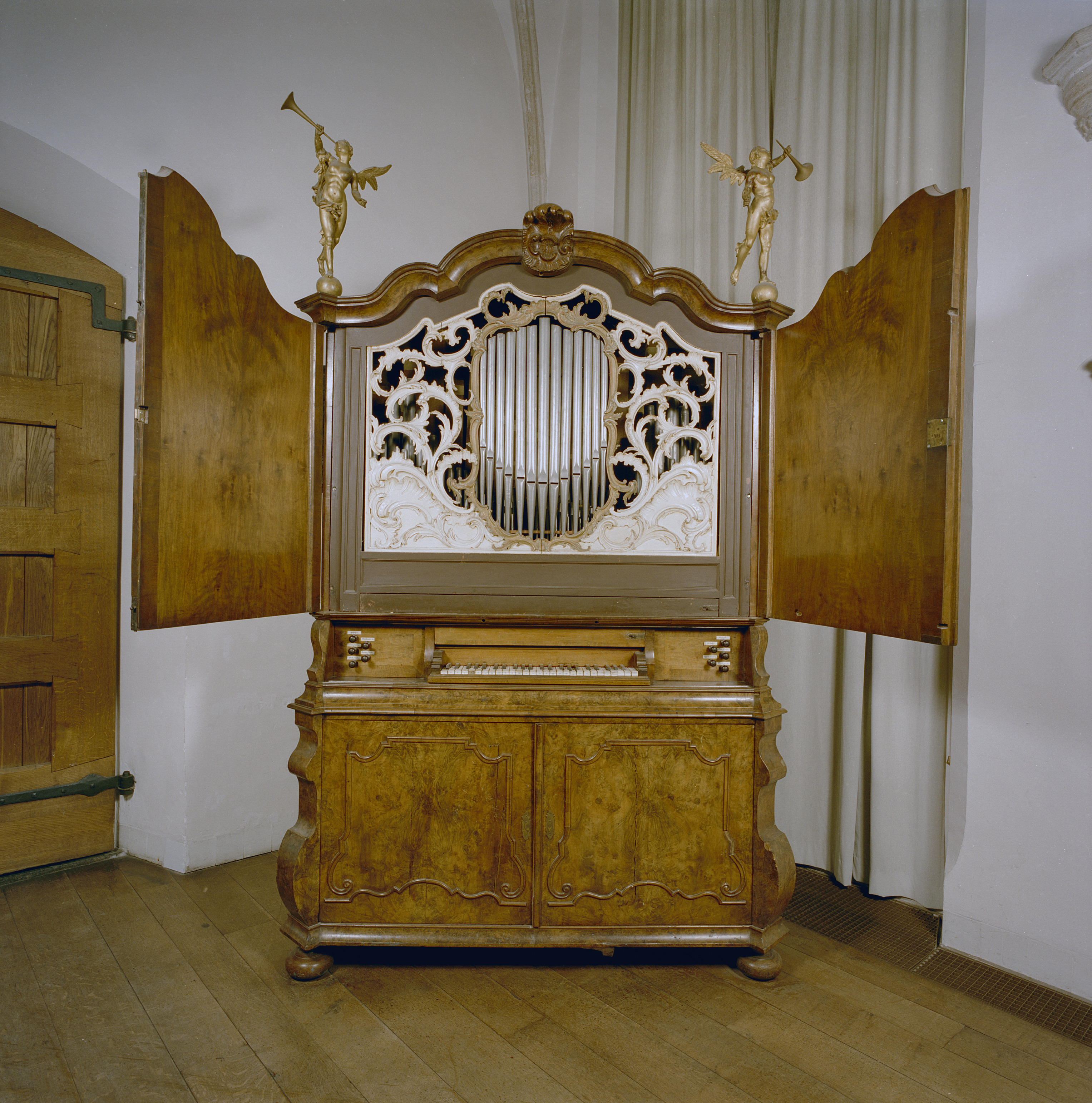 Sint-Jacobskerk: Interieur Assendelftkapel, aanzicht kabinetorgel, orgelnummer 532 (opmerking: Gefotografeerd voor Het Historische Orgel in Nederland 1726-1769, bladzijder 233)